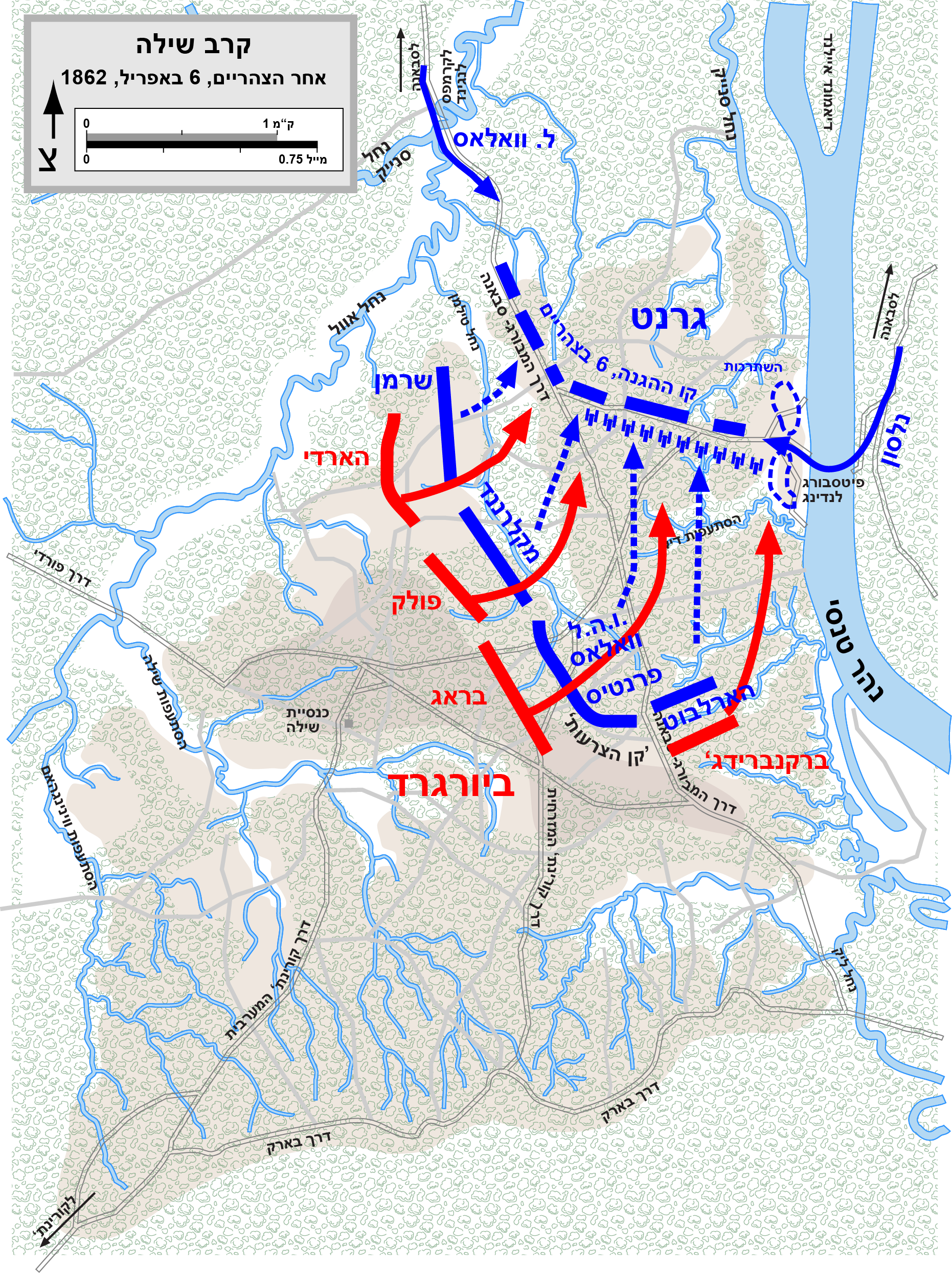 One of a series of three maps of the Battle of Shiloh of the American Civil War. Drawn in Adobe Illustrator CS5 by Hal Jespersen. Graphic source file is available at